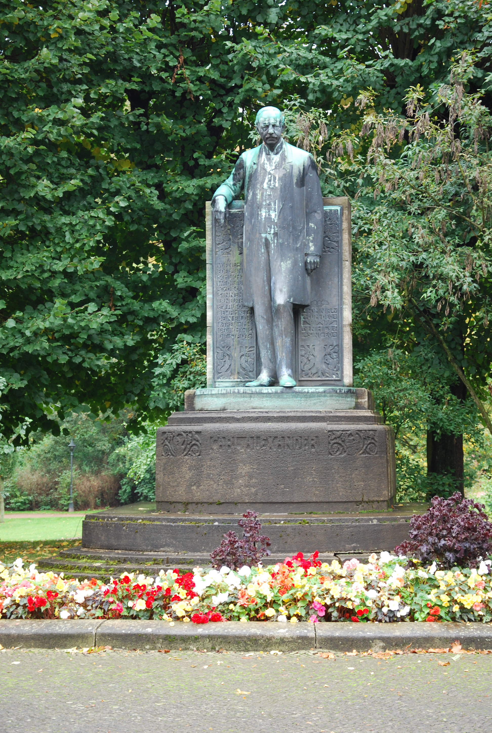 Denkmal für Großherzog Carl Alexander in Eisenach